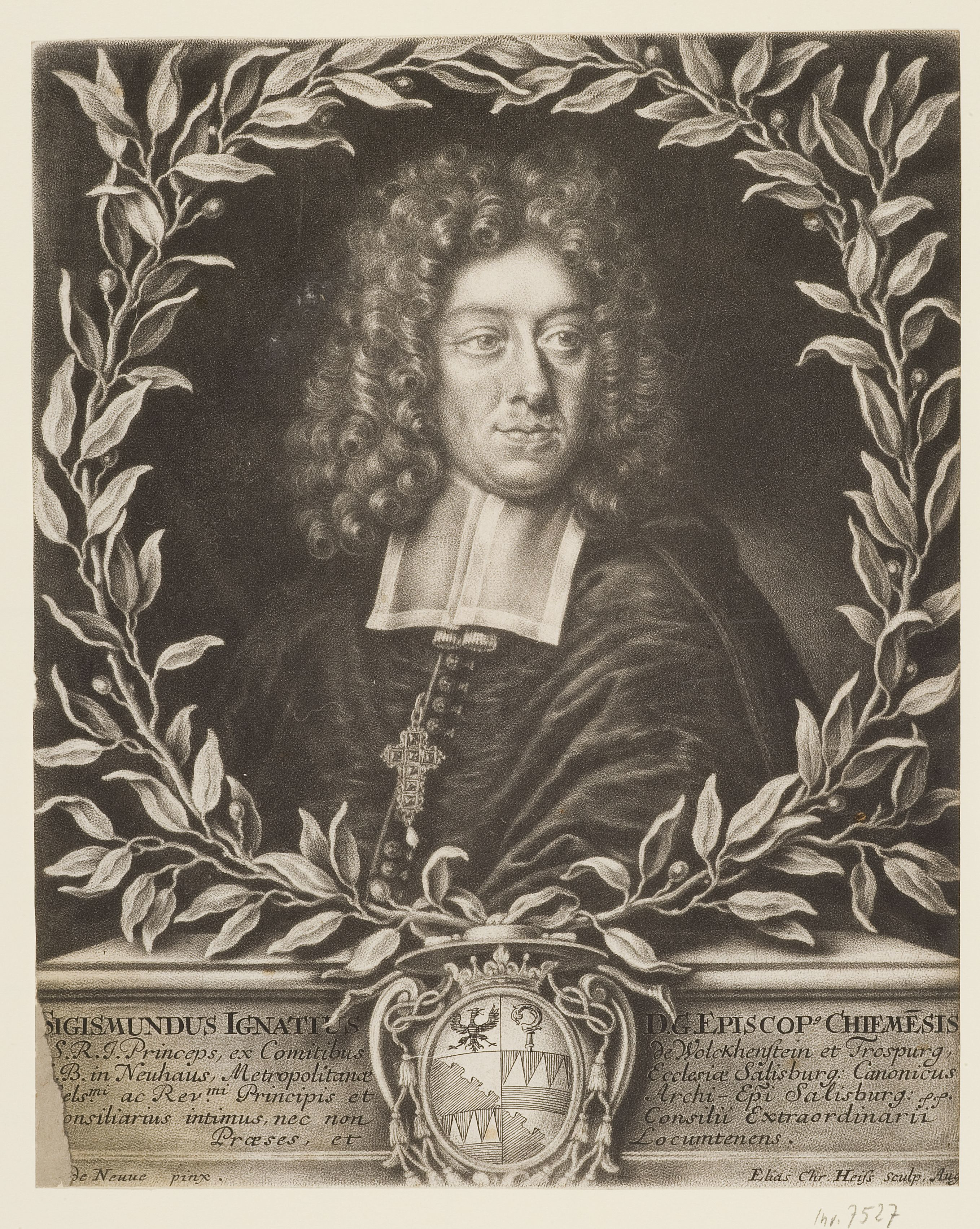 Sigmund Ignaz von Wolkenstein-Trostburg, Schabkunst; Herzog Anton Ulrich-Museum, Signatur ECHeiss AB 3.9, Inv. Nr. 7527